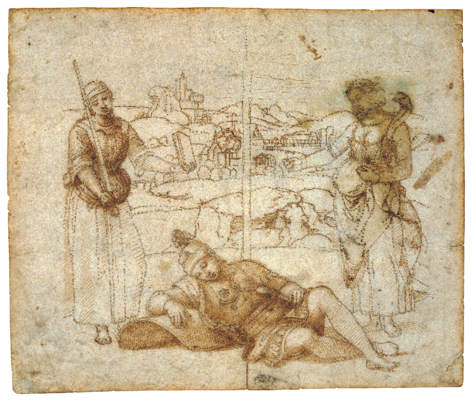 Этюд к картине «Сон рыцаря»